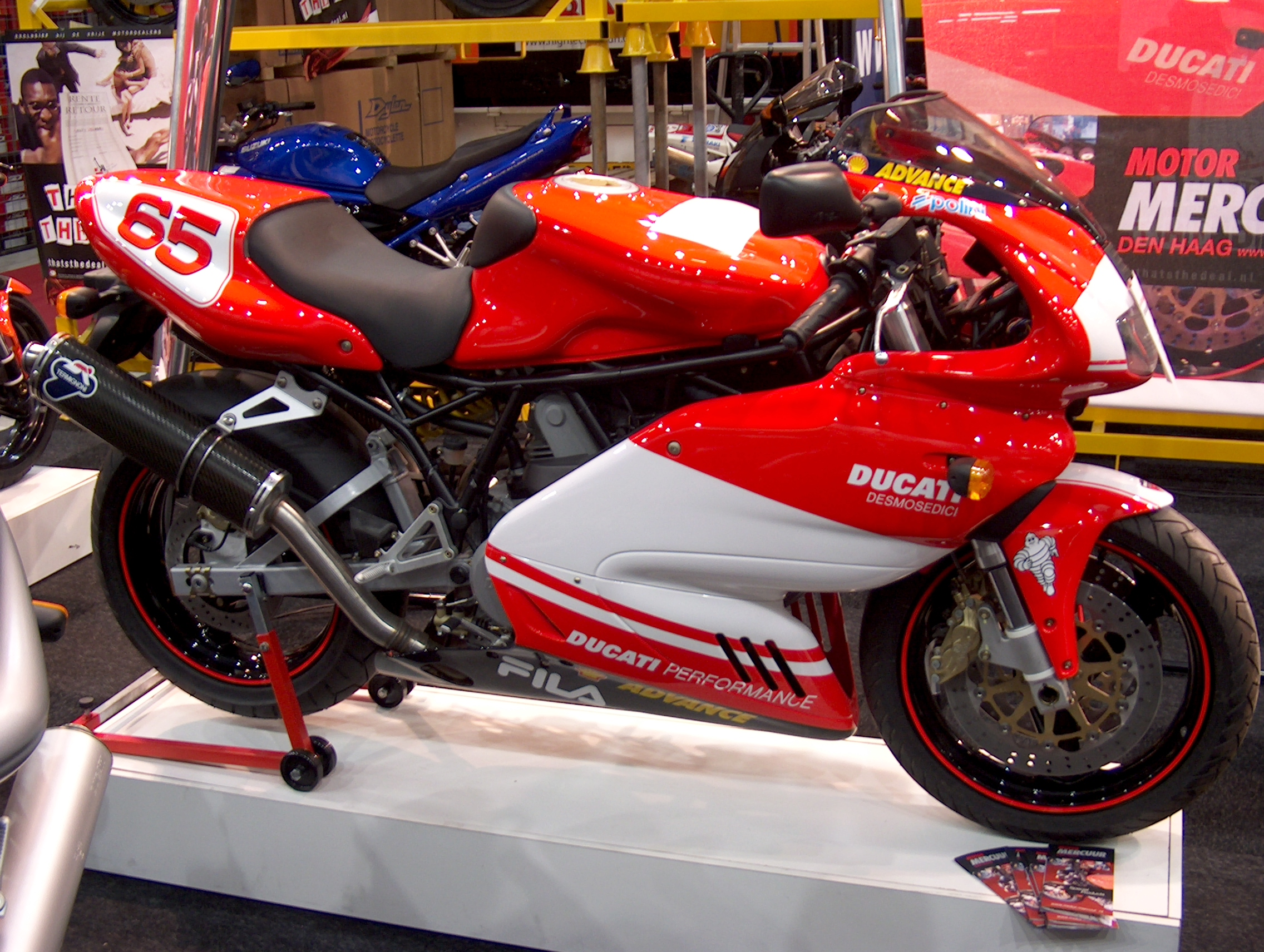 Dit is een Ducati Supersport in de Look van de Desmosedici, de Supersport is gemodificeerd v.w.b. kleurstelling van de kuipdelen, de kleur van het frame, de velgen, uitlaat etc. Het betreft een Supersport 620, opgebouwd door de firma Motor Mercuur te Den Haag. Deze motorfiets is als een soort Mercuur-special voorzien van het uiterlijk van de toemalige Moto GP fiets van Loris Capirossi.